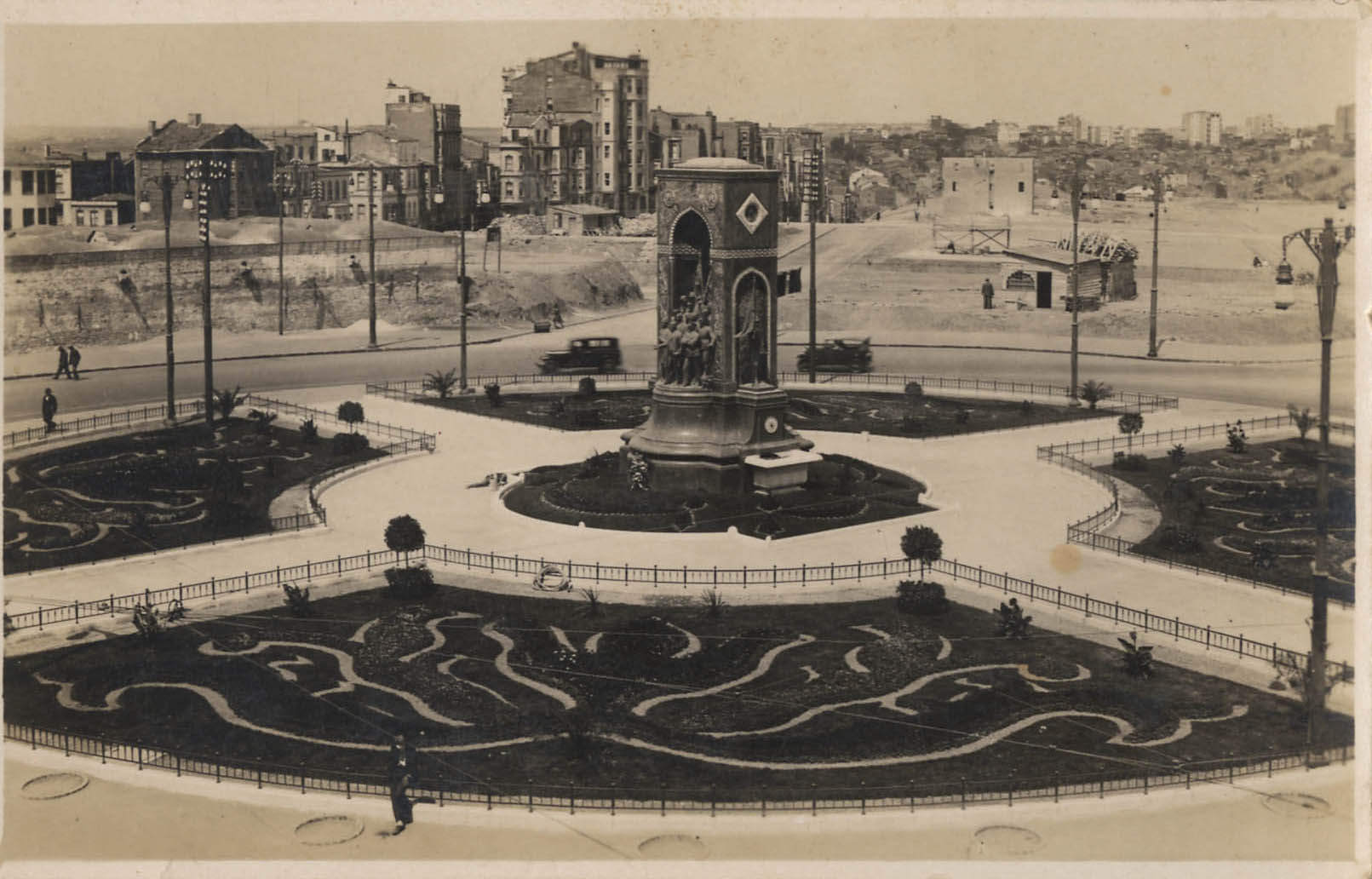 Taksim Square after the destruction of the Taksim Millitary Barracks SALT Research, Photograph Archive Taksim Kışlasının yıkımından sonra Taksim Meydanı SALT Araştırma, Fotoğraf Arşivi